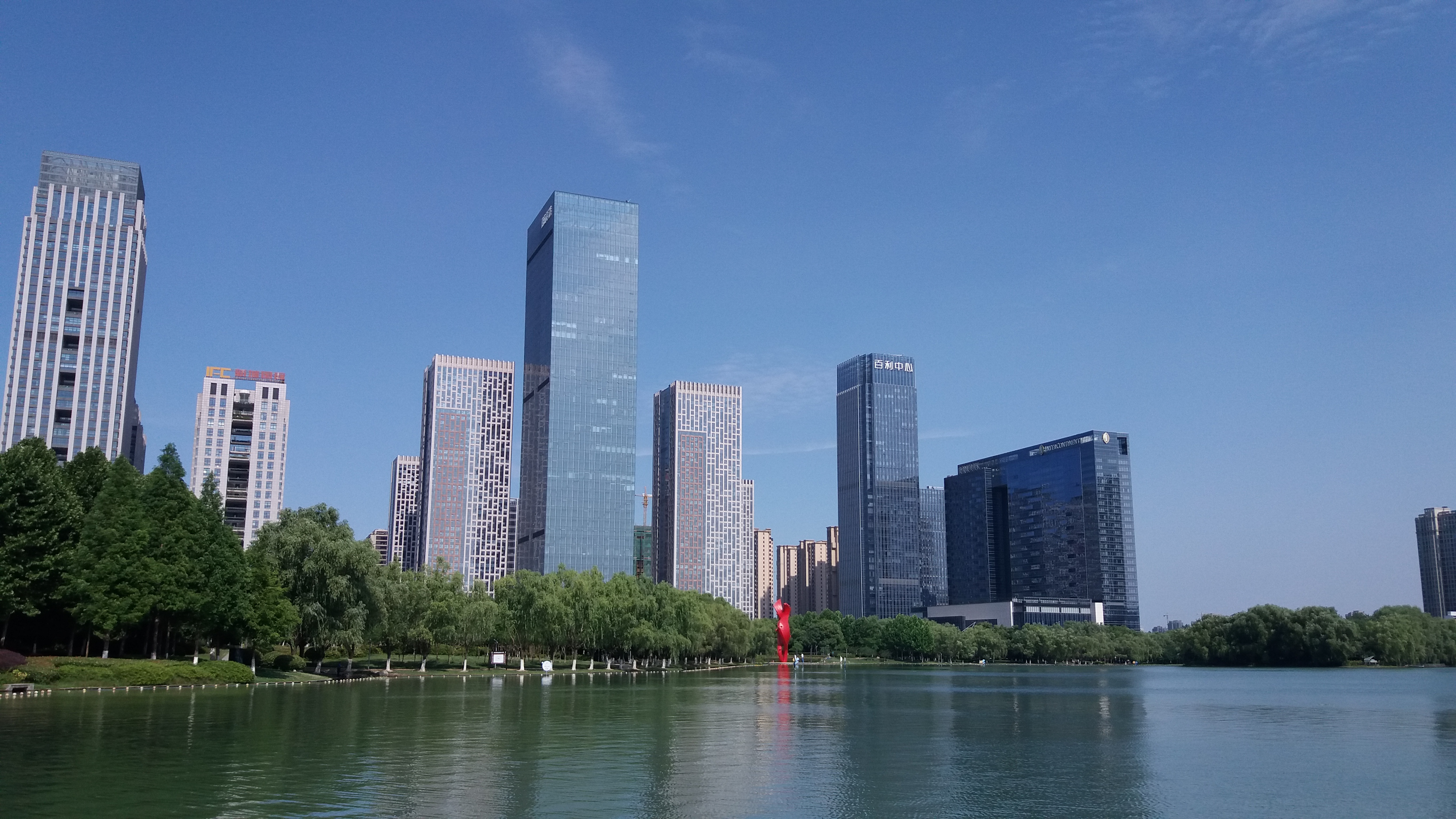 安徽合肥天鹅湖周边天际线